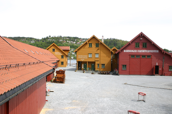 Noheimsund - Hardanger Fartøyvernssenter